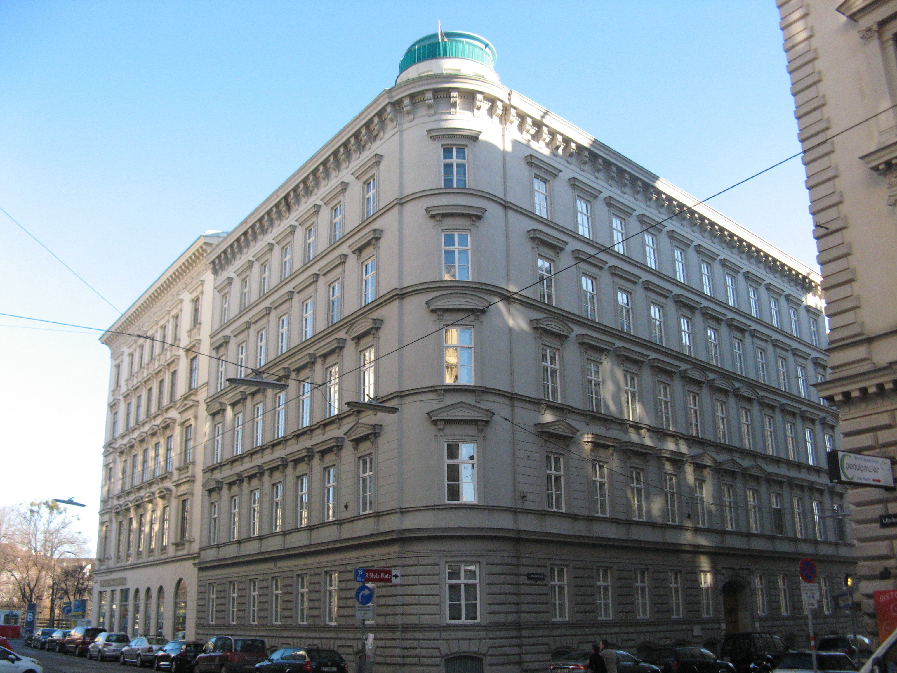 Landau-Palais (1869-70) von Carl Schumann, Elisabethstraße 22, Wien-Innere Stadt